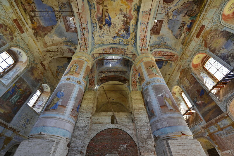 Собор Троицкий (церковь Троицкая): центр, Макарьев, Макарьевский район, Костромская область